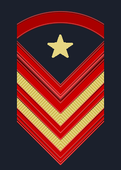 Sottocapo di prima classe scelto qualifica speciale